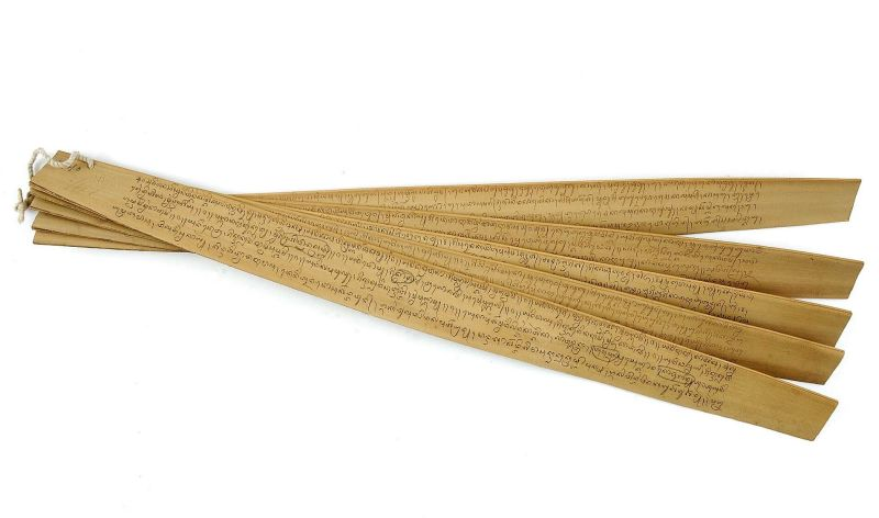 Lontarhandschrift. Astronomische gegevens tot regeling van het landbouwjaar in het Balinees op vijf vellen lontarblad